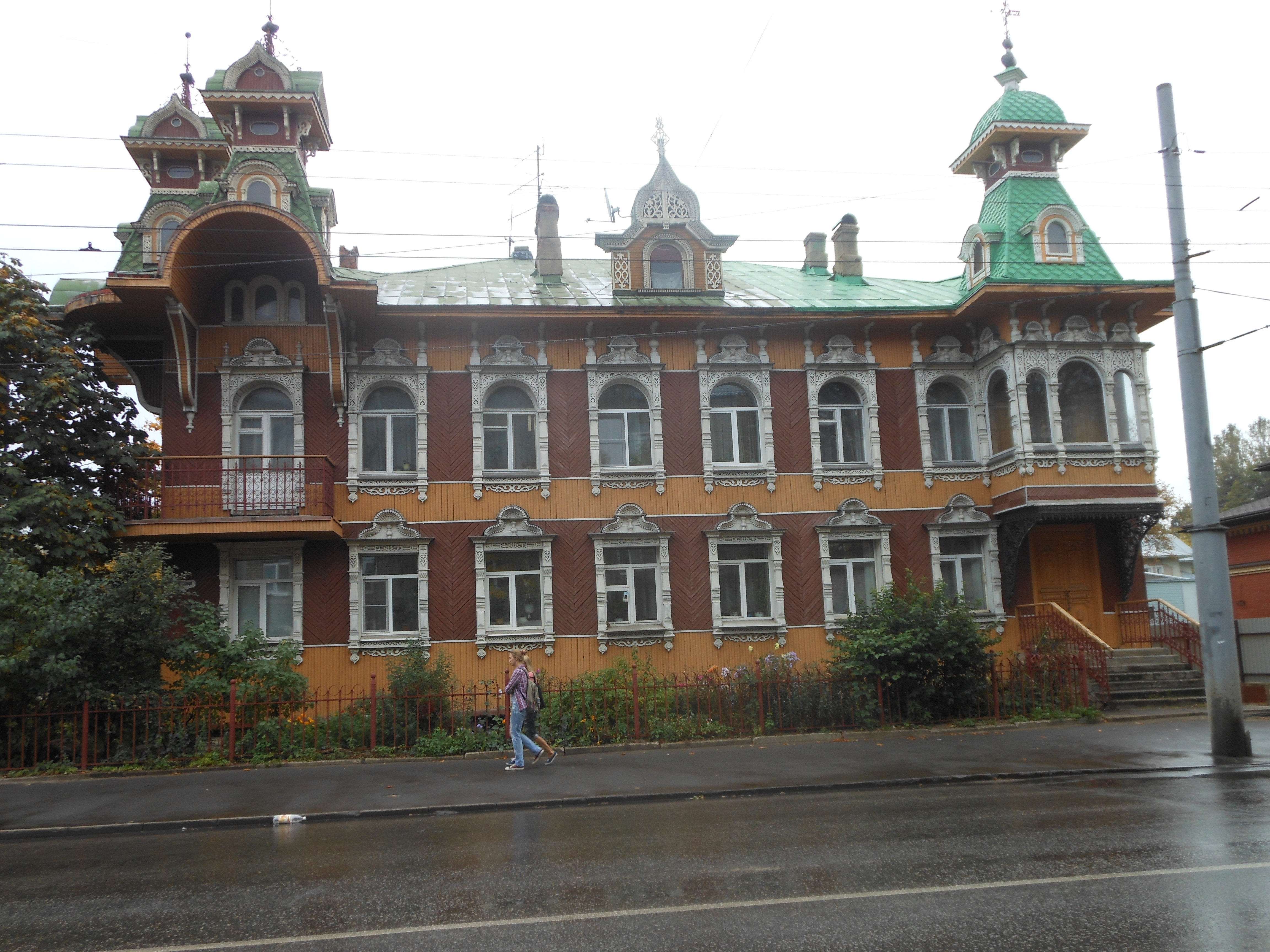 Дом художников в Рыбинске